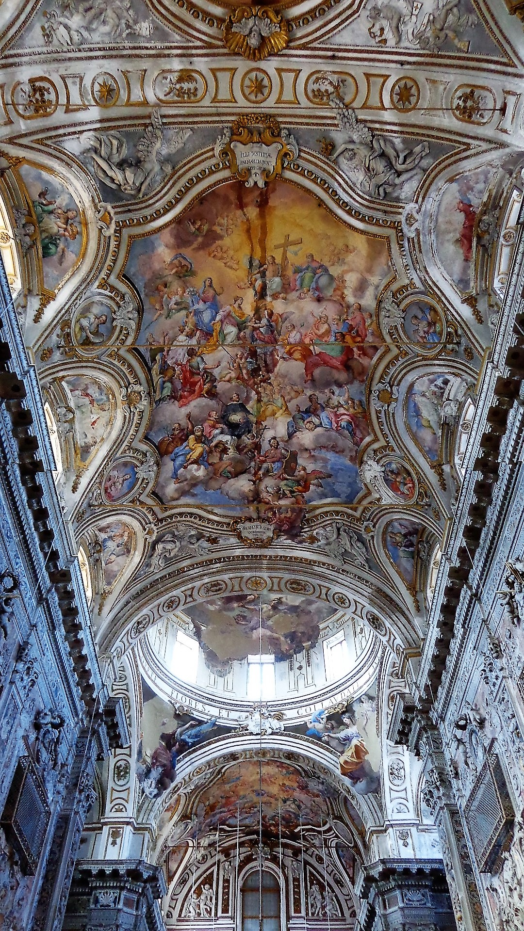 Affresco volta navata.